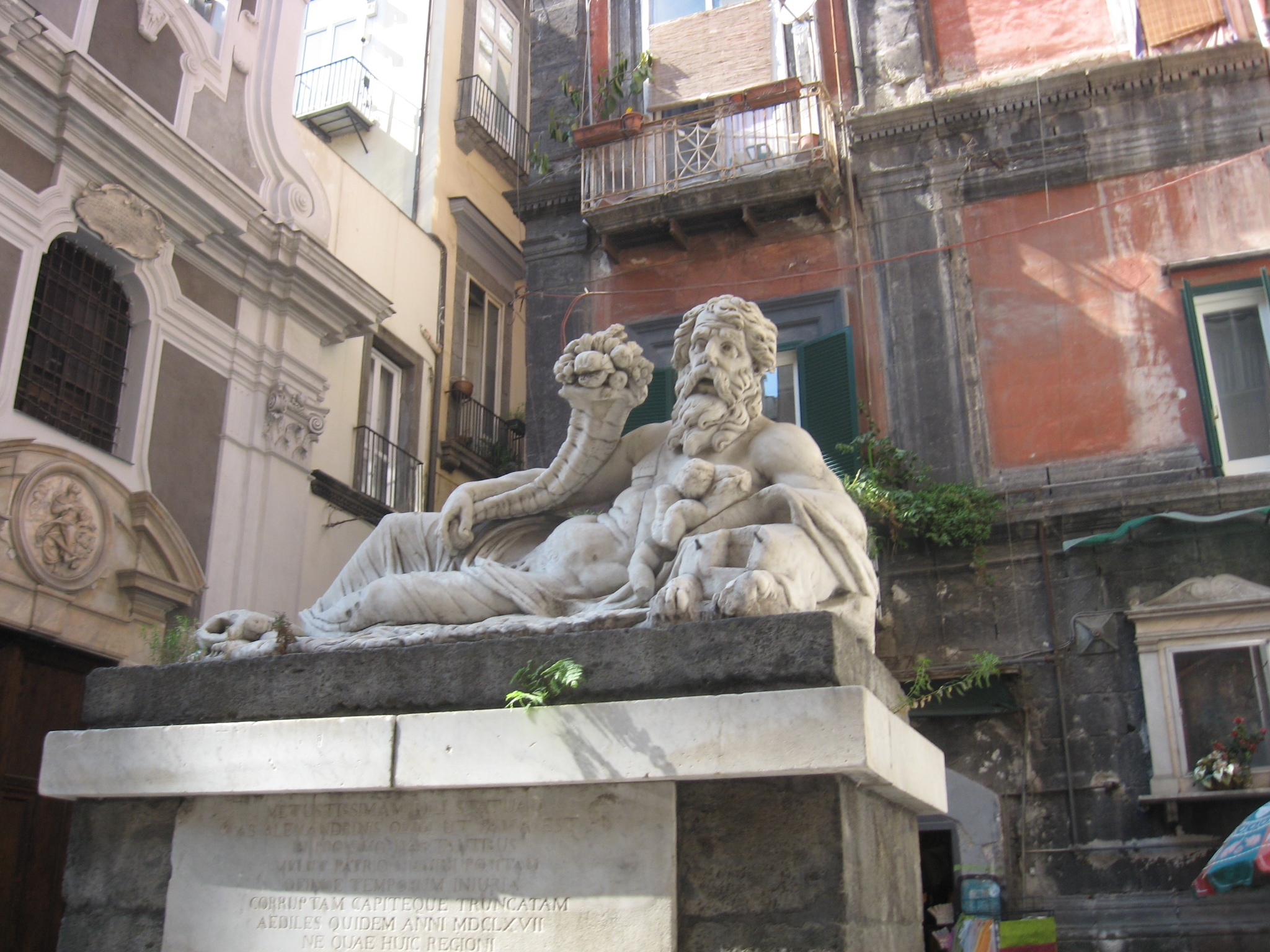 Nílus-szobor, Nápoly